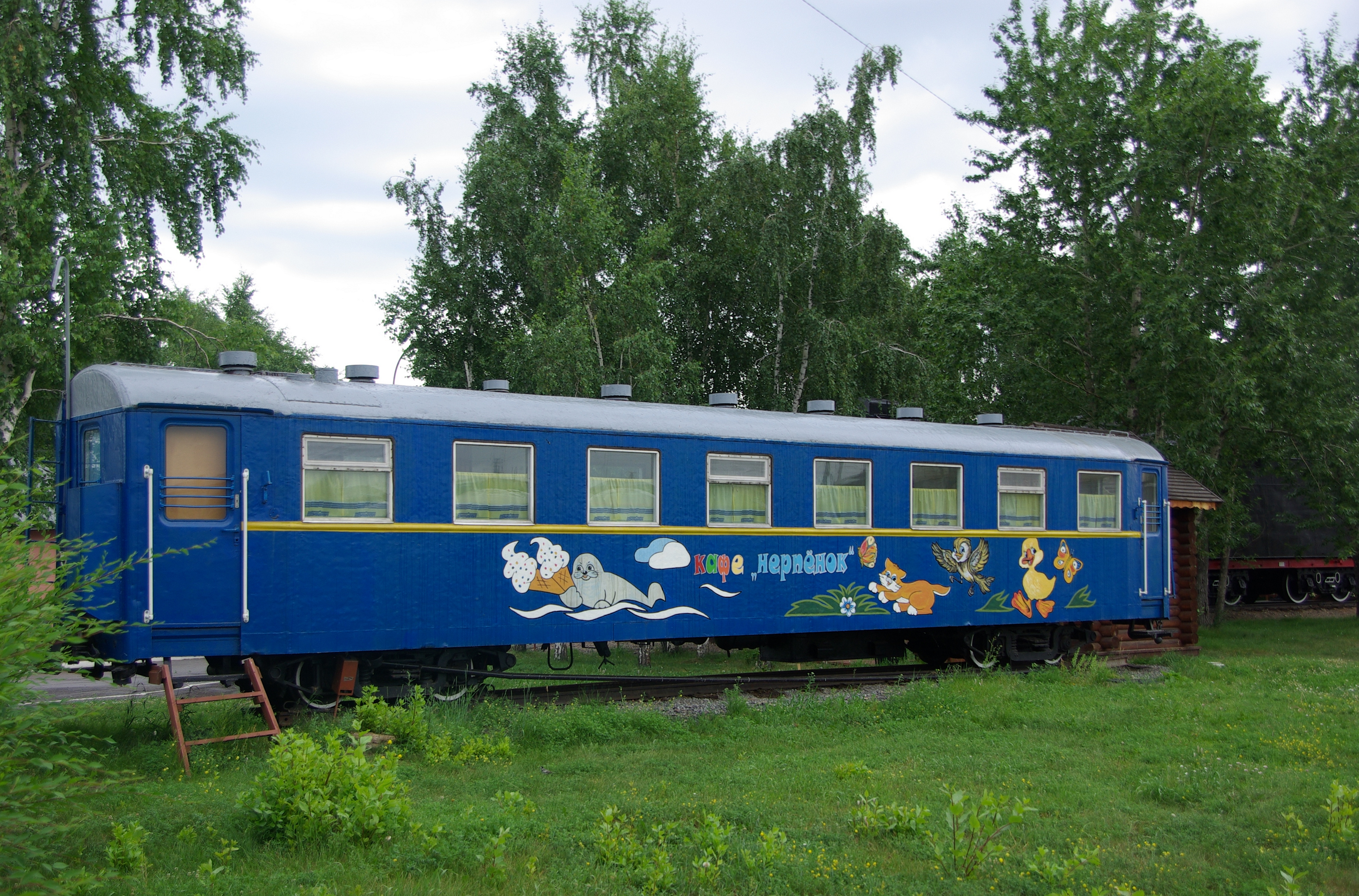 Иркутская детская железная дорога